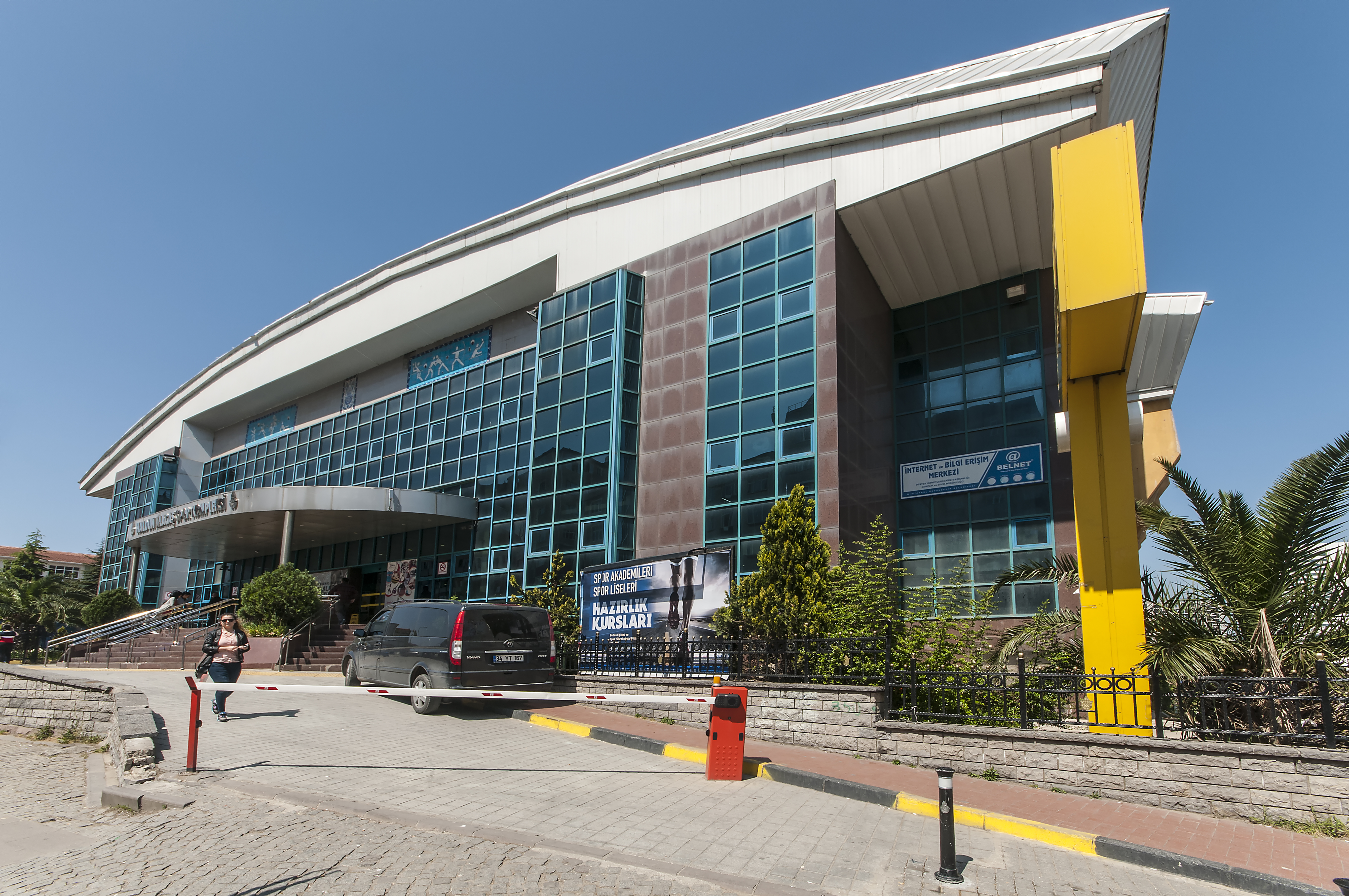 Spor Salonu'nun 2016'da çekilmiş bir fotoğrafı.